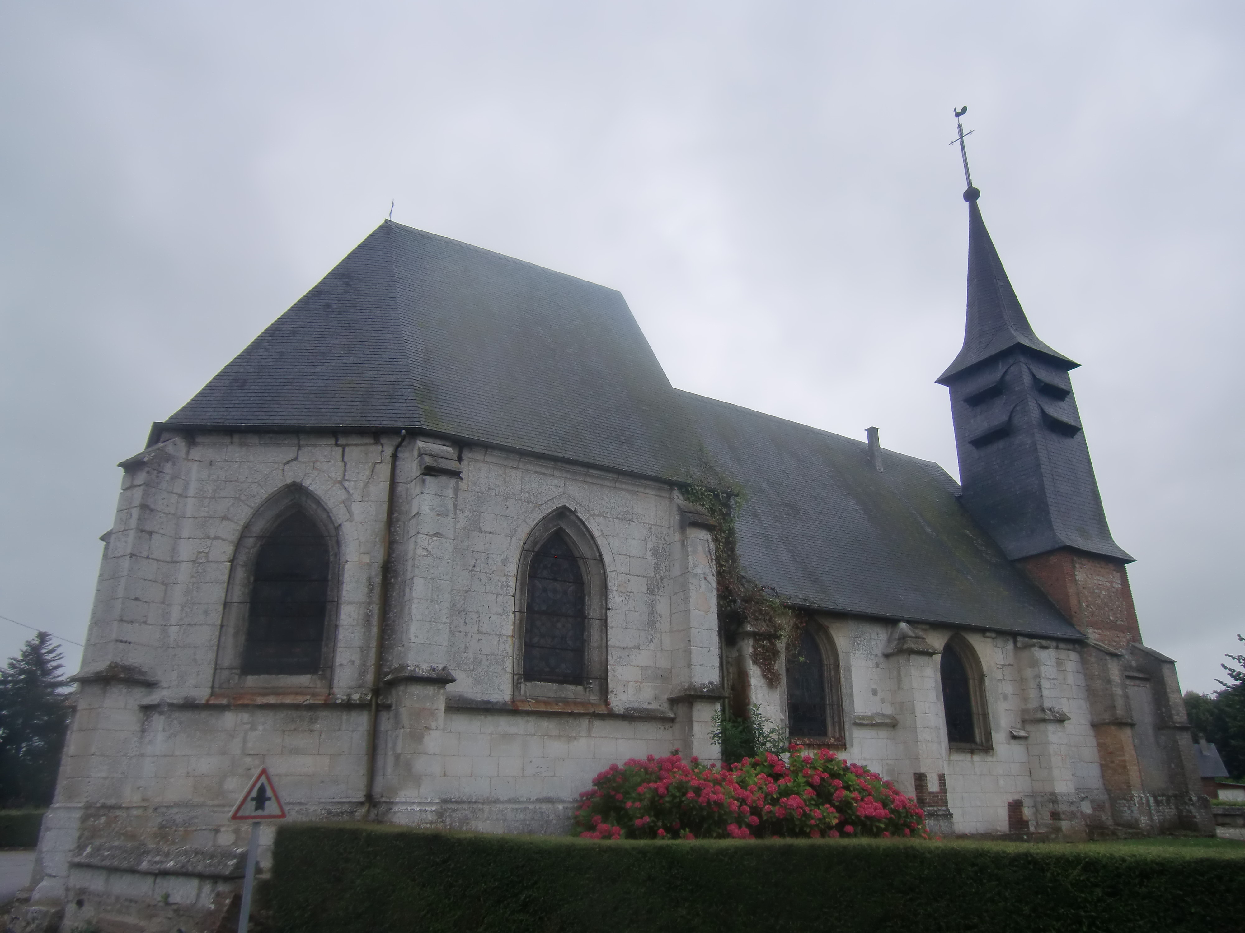 Église de Saint-Ouen-du-Tilleul (Eure, Normandie, France)